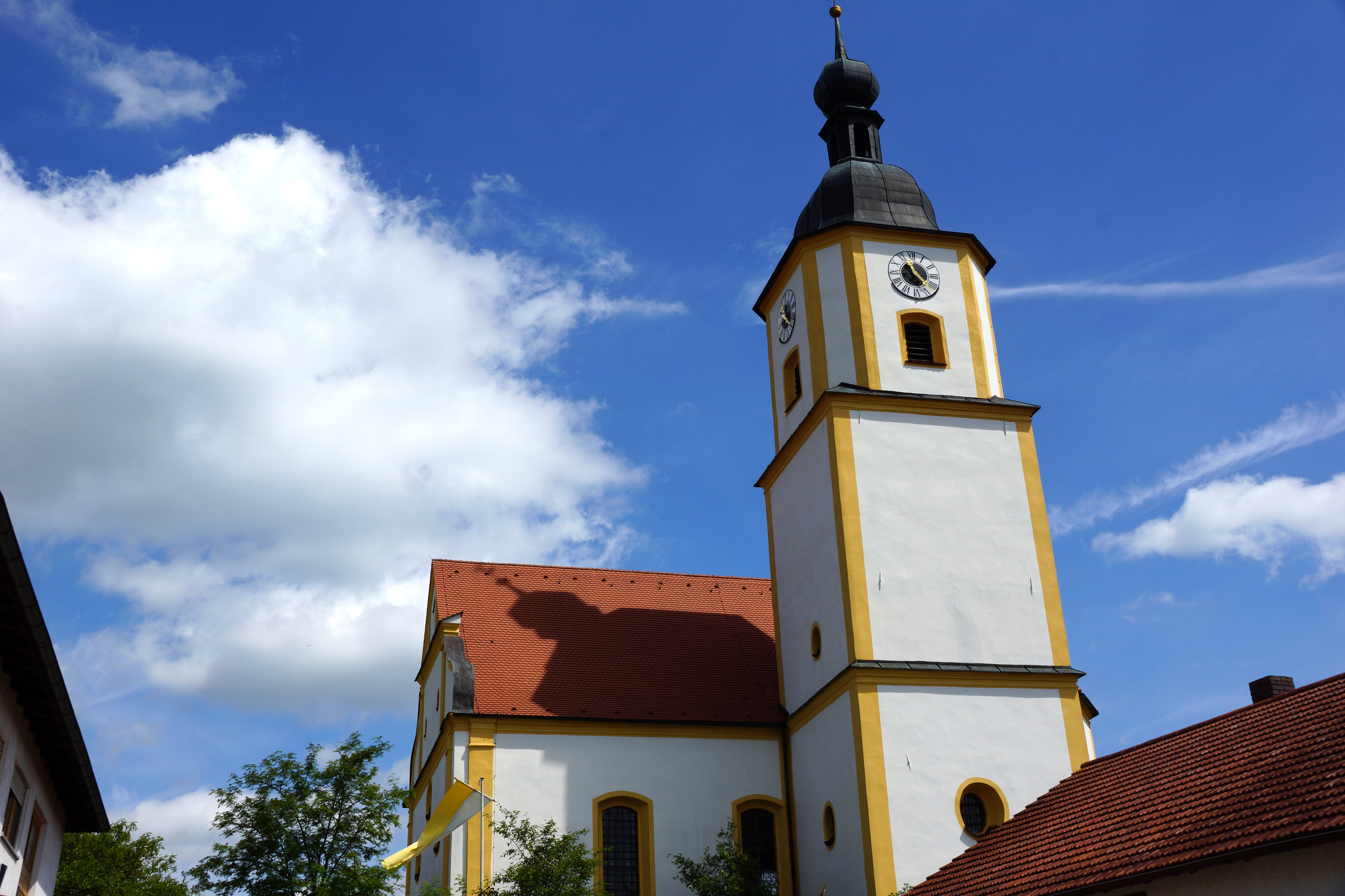 Die katholische Pfarrkirche St. Leonhard in Waltersberg bei Deining